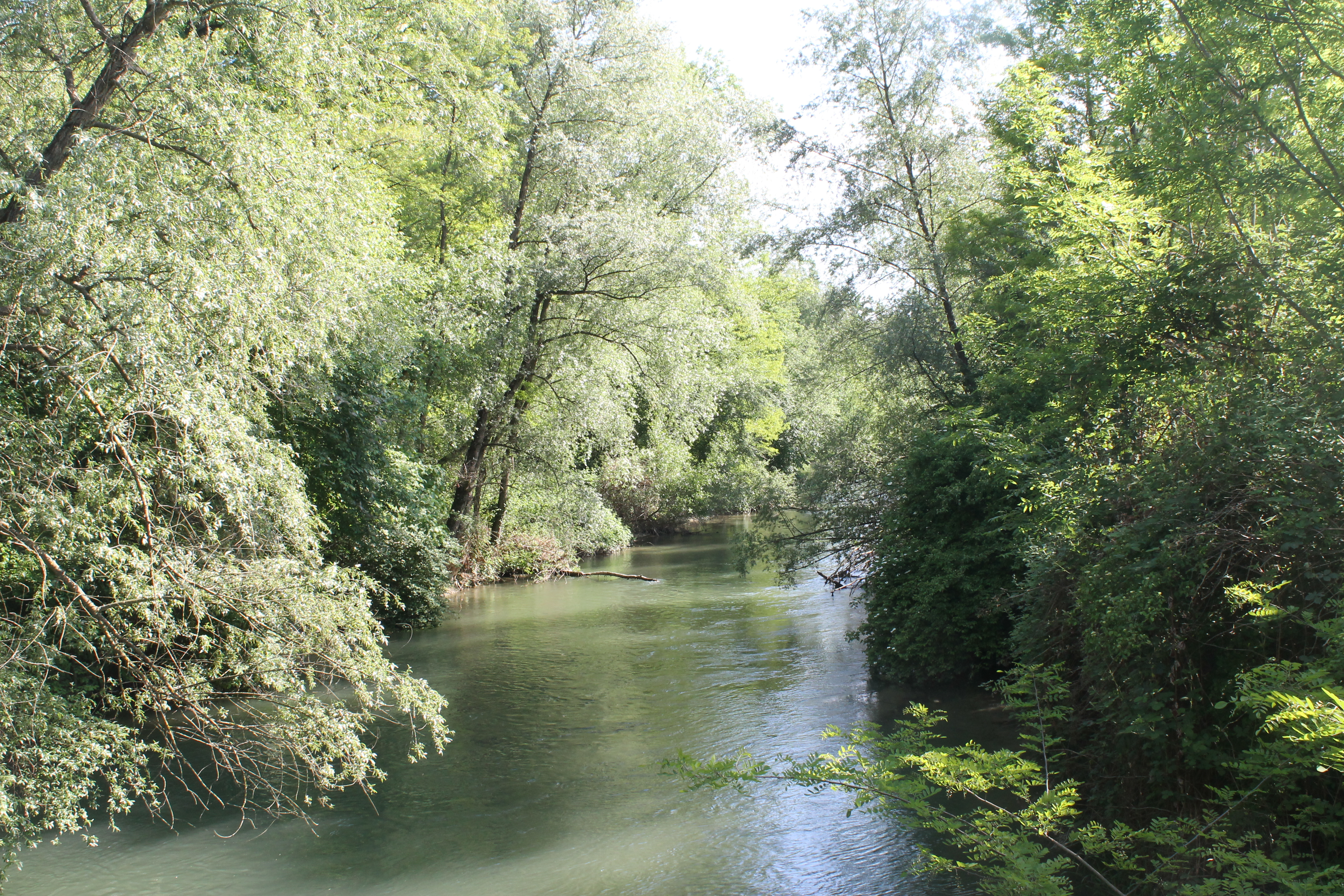 Auenwald bei Brugg